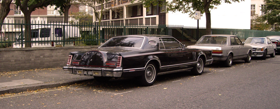 Lincoln MKV